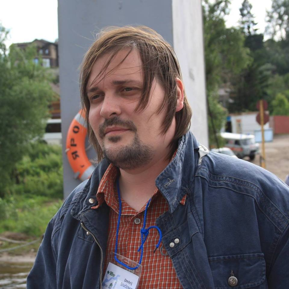 RET-Poŝehonjo